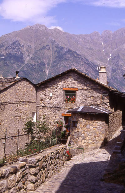 Cerler, Benasque (Huesca). Autor: Rafaelji. Original en diapositiva de 35 mm. Tomada en Julio de 1998.